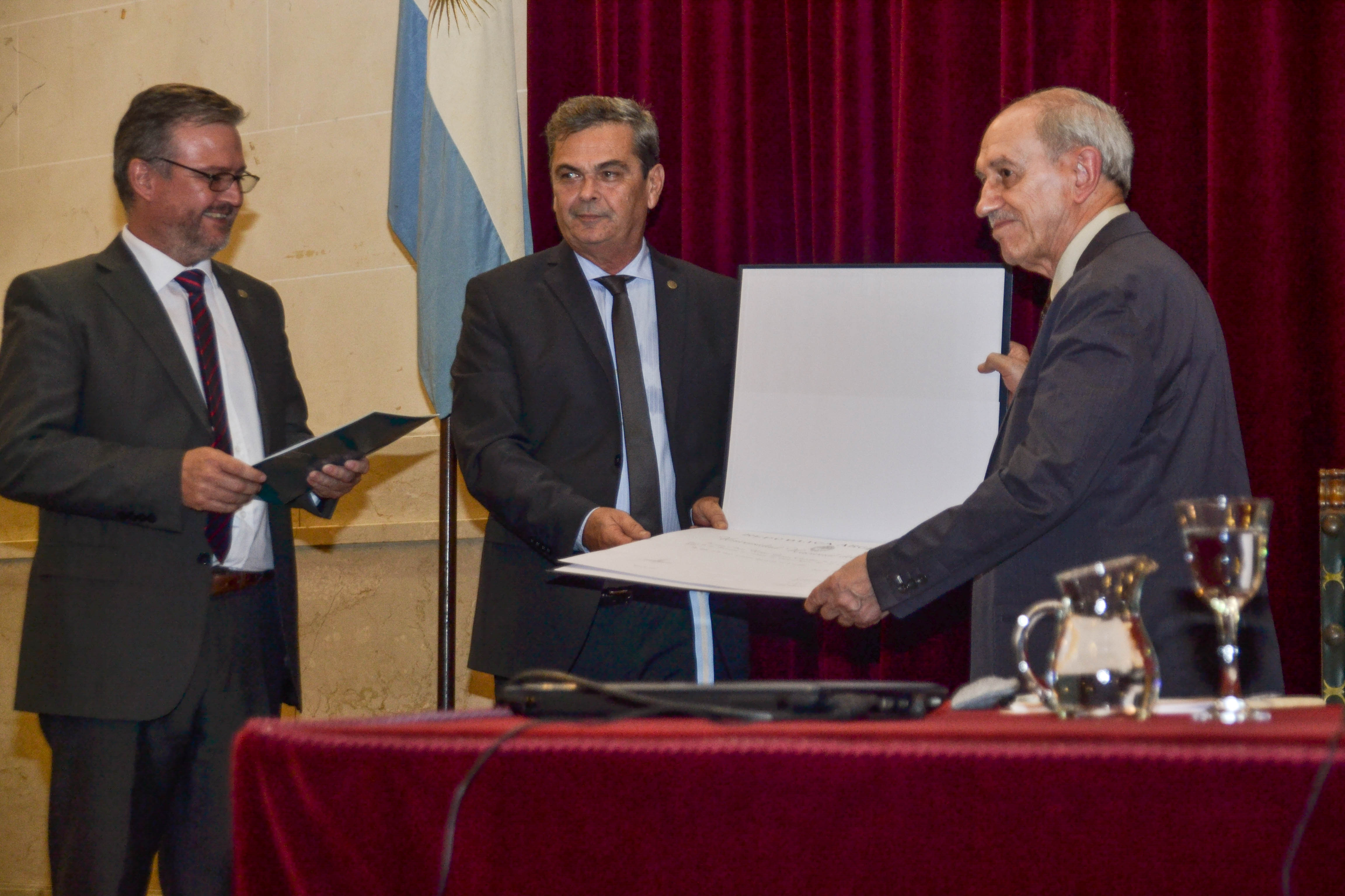 Néstor García Canclini de visita en Santa Fe Mayo 2017. En el cierre del encuentro VIII Encuentro Nacional y V Latinoamericano La Universidad como objeto de investigación “La Reforma Universitaria entre dos siglos”, el prestigioso académico recibió la máxima distinción que otorga la casa de altos estudios.